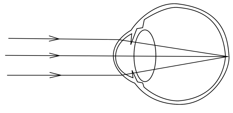 Emmetropia